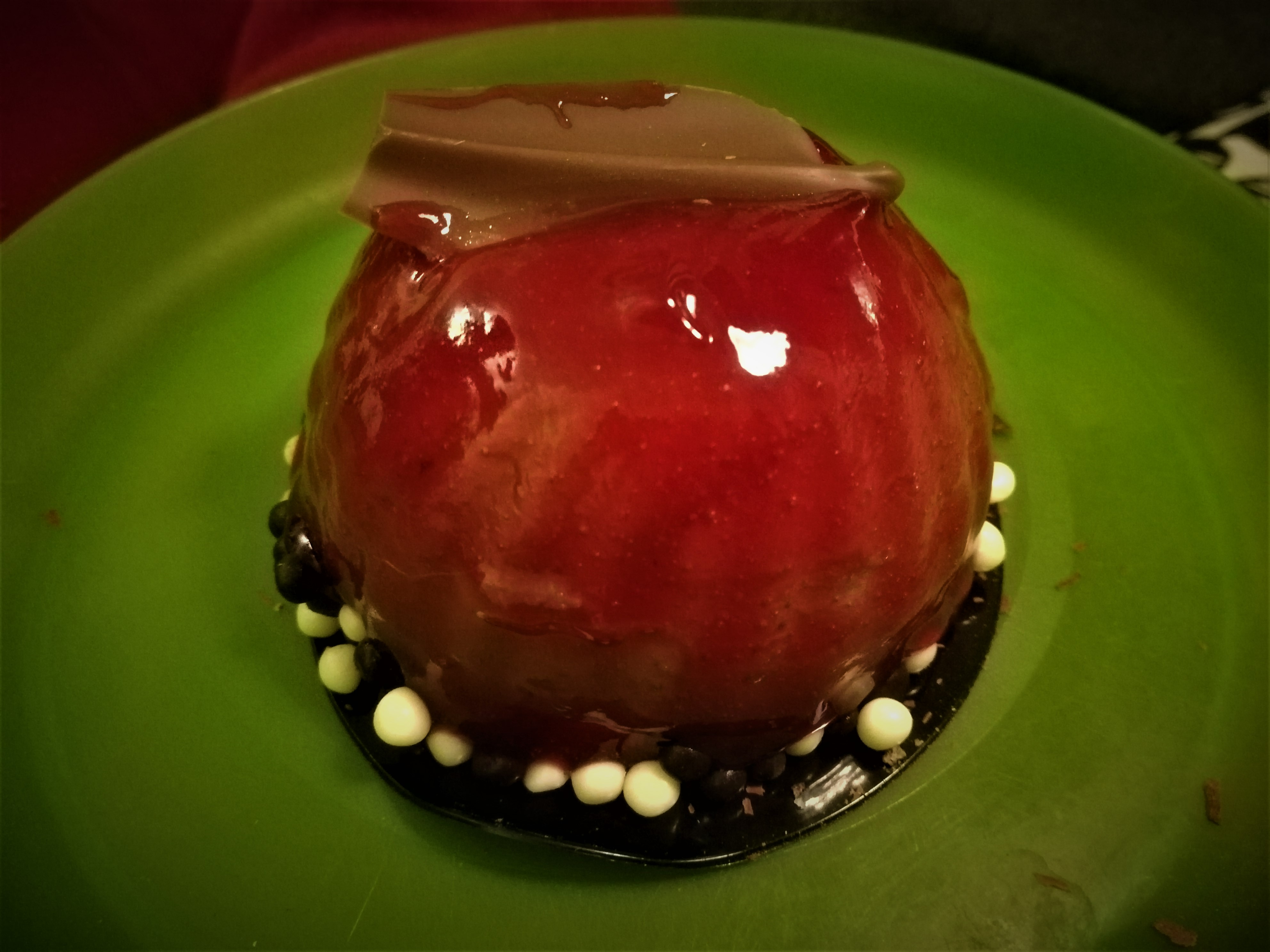 Ciastko malinowo-mangowe z City Parku w Poznaniu.